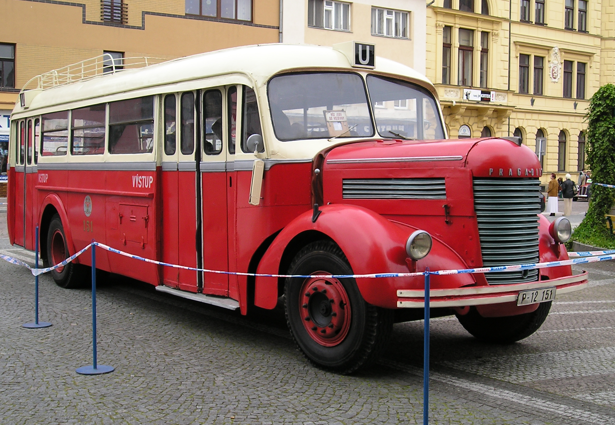 Praga NDO na náměstí ve Vysokém Mýtě